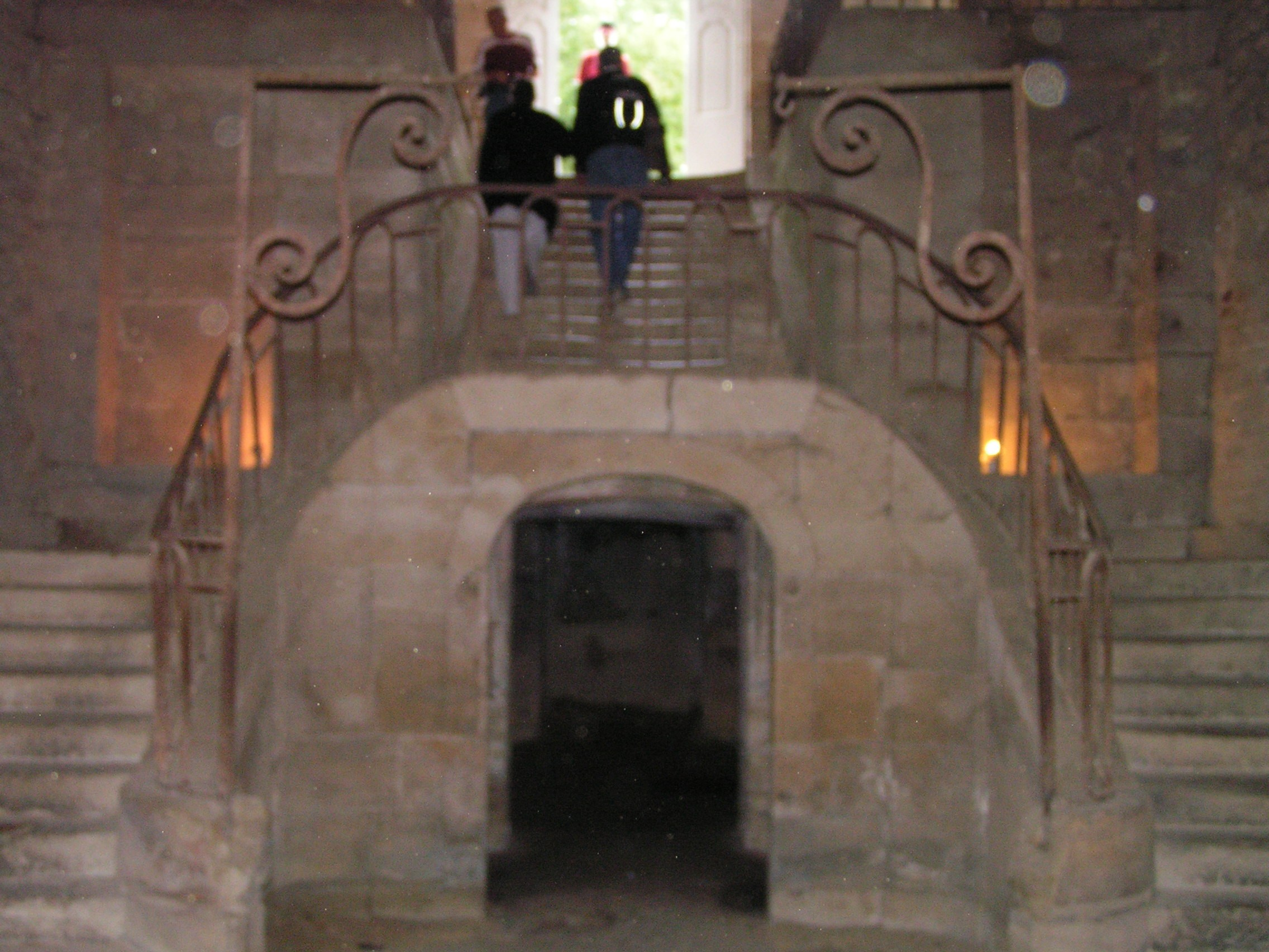 les Forges de Buffon à Buffon (Côte-d'Or)